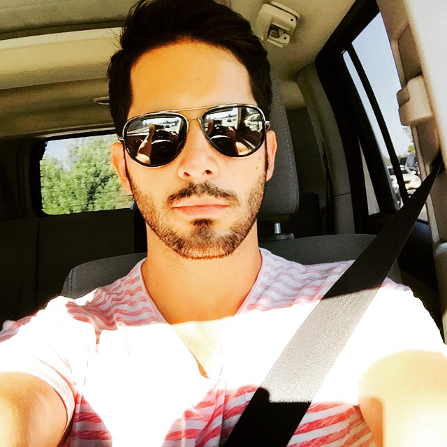 Foto tomada por mi (Lucas Velazquez) con mi celular en Los Angeles California